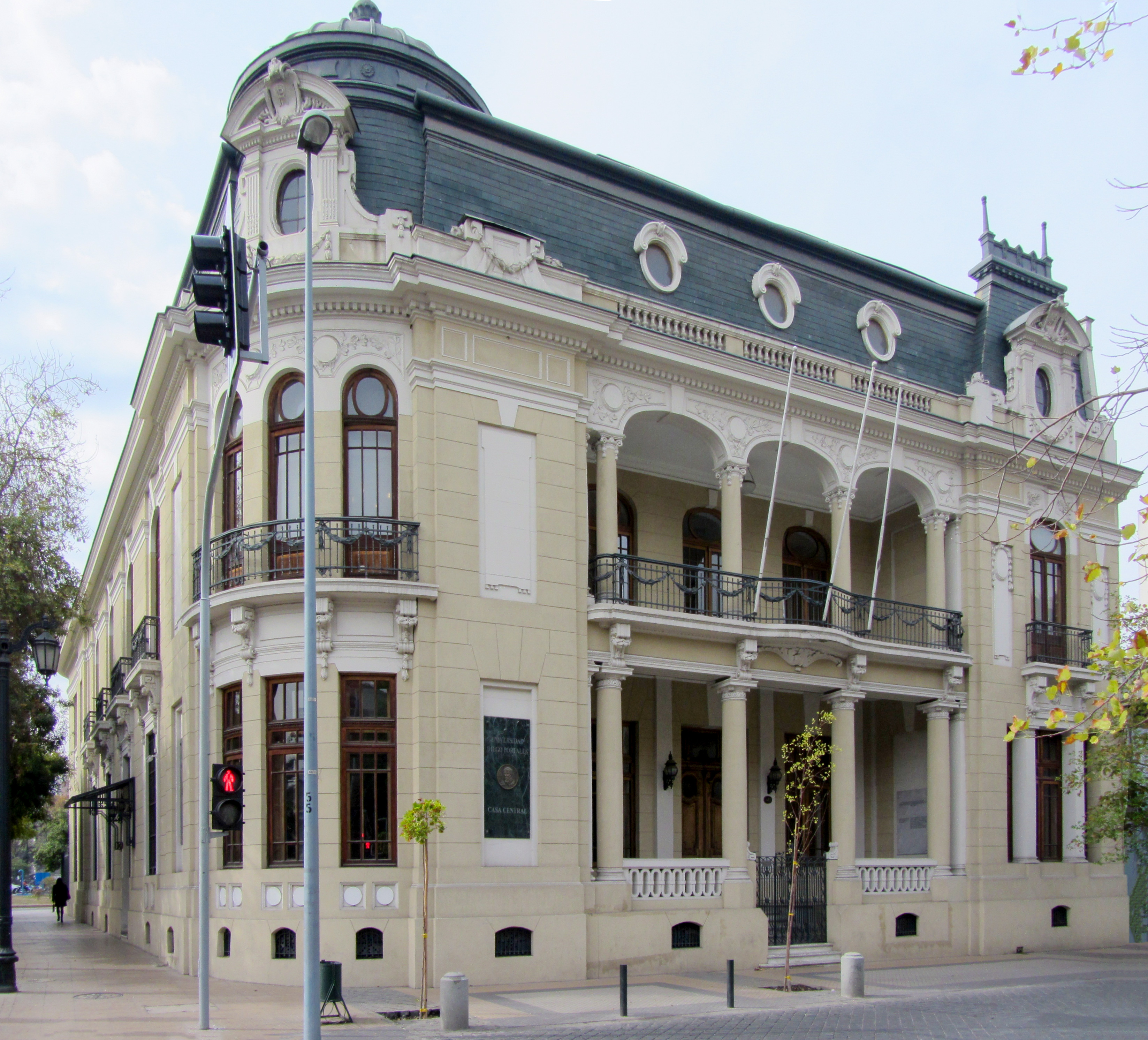 Palacio Piwonka, sede central de la Universidad Diego Portales